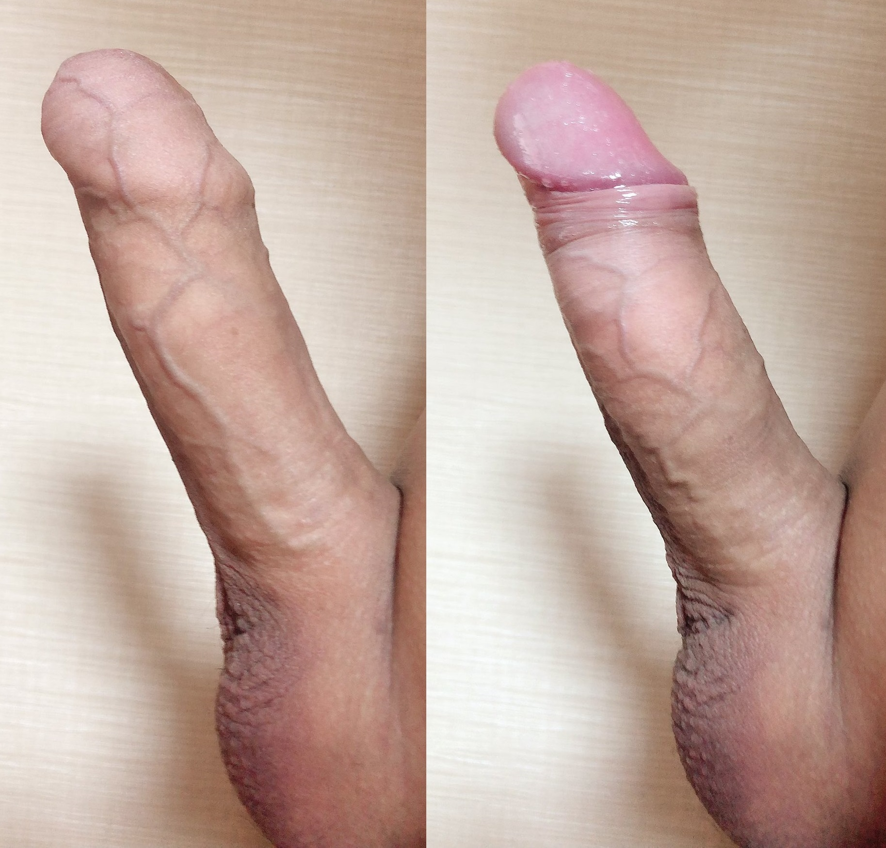 同一人物の男性器の仮性包茎。左を撮影後包皮を翻転し右を撮影。その後合成。